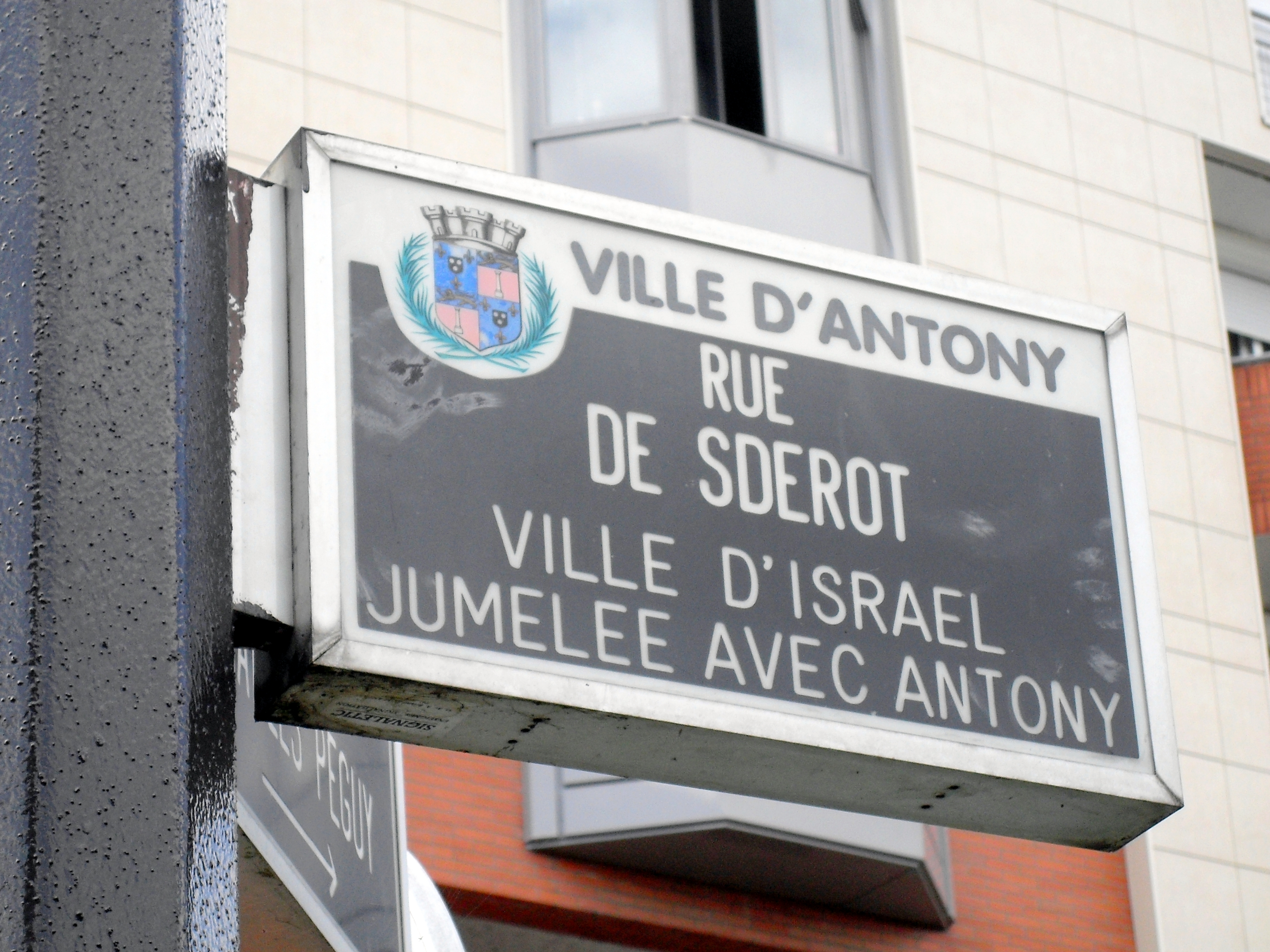 Antony (Hauts-de-Seine, France) - plaque de la rue de Sdérot (ville d'Israël jumelée avec Antony) où se trouve la synagogue. Les plaques de rue d'Antony sont éclairées la nuit.